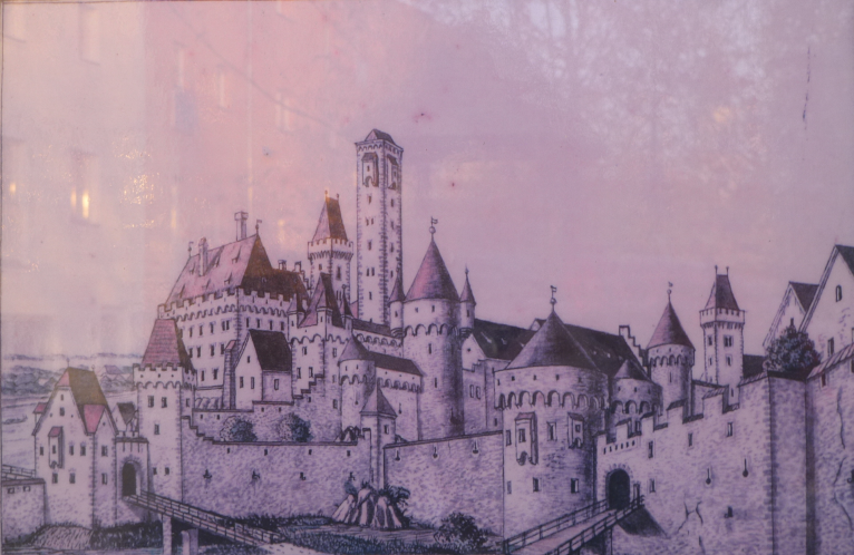 Burg Schärding, gezeichnet im 19. Jahrhundert von Johann Ev. Lamprecht.